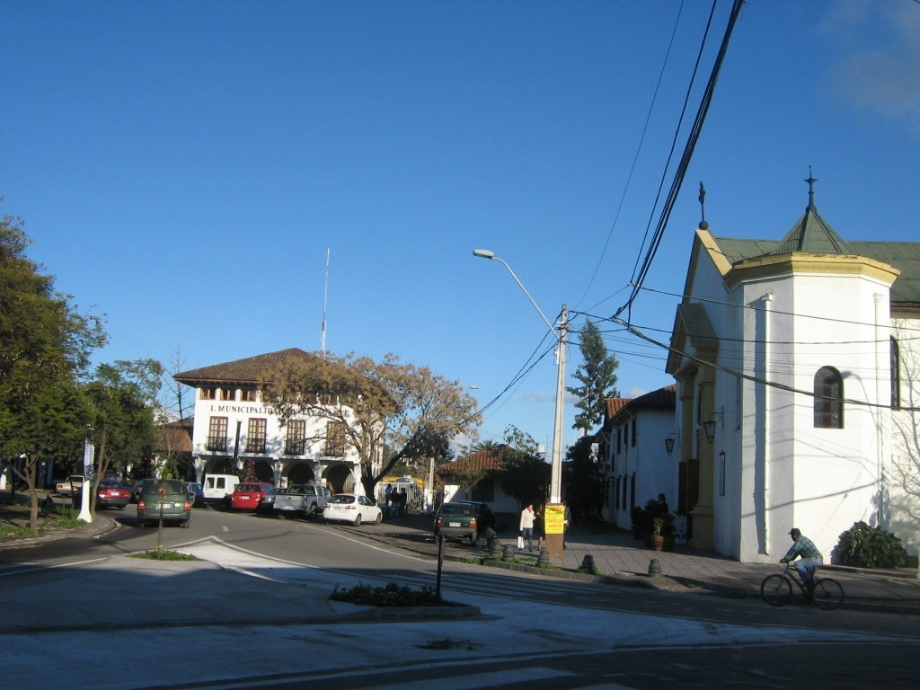 Plaza de Talagante, al fondo I. Municipalidad de Talagante, a la derecha - en primer plano - la Parroquia Inmaculada Concepción